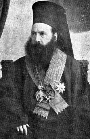 Климент Търновски (1840-1901)